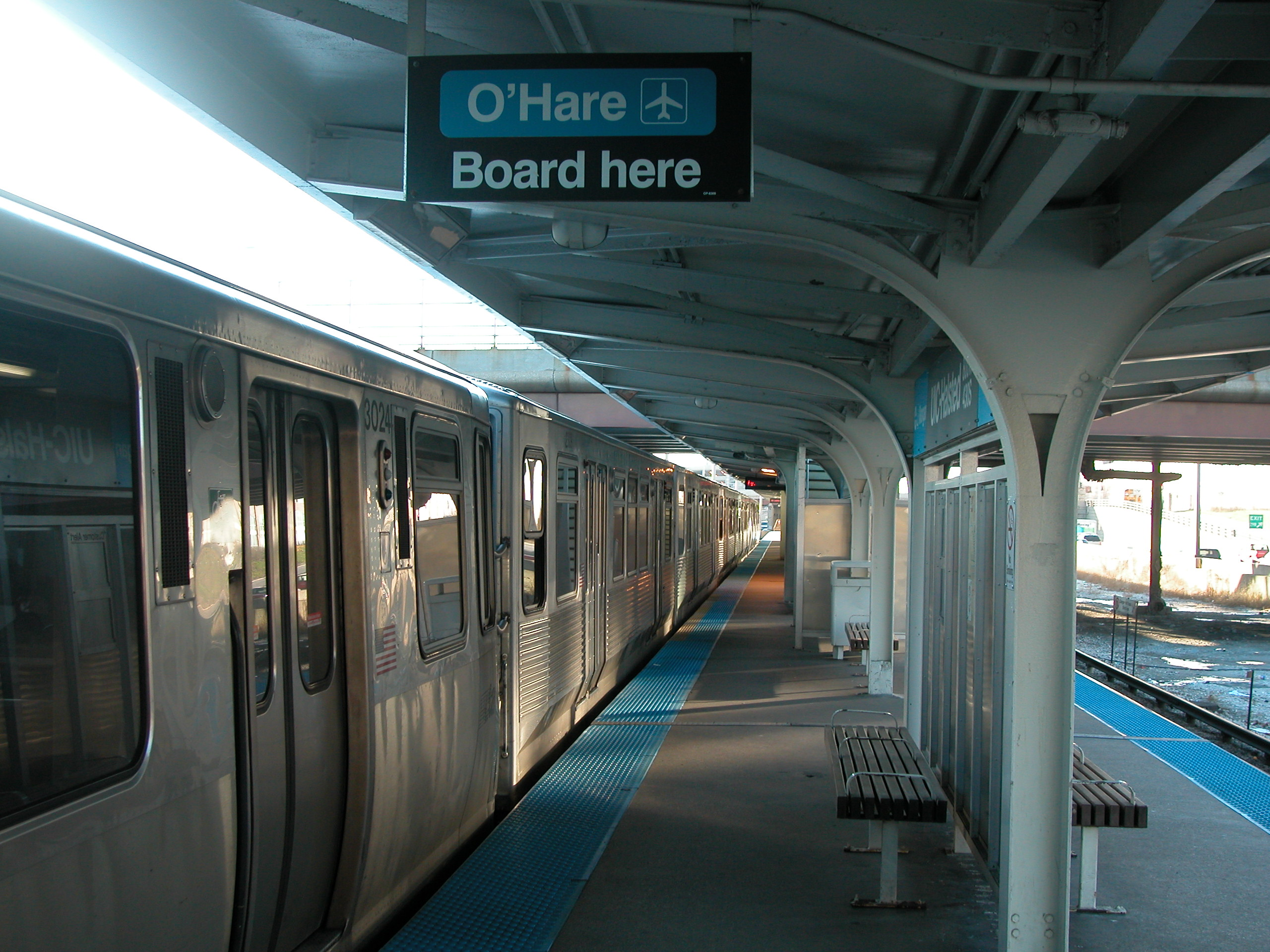 20031211 34 CTA Blue Line L @ UIC Halsted